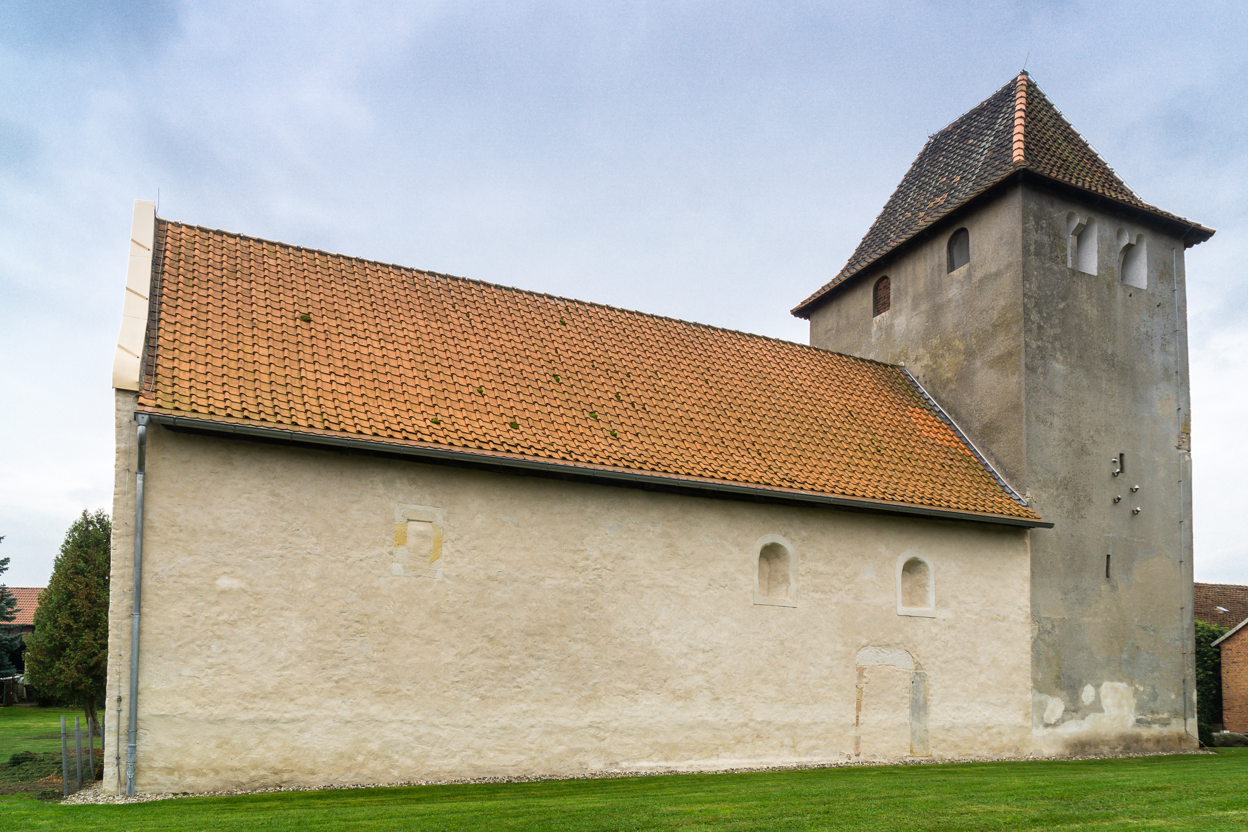 Kirche Hörsingen, mit spätmittelalterlicher Kreuzplatte (in der Nordwand des Kirchenschiffes vermauert), Große Straße in Oebisfelde-Weferlingen OT Hörsingen